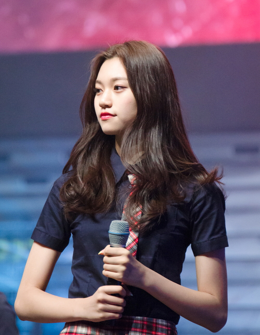 160521 백발백중